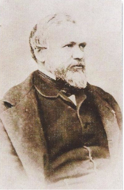 Éphrem Houël du Hamel (1807 - 1885), inspecteur général des Haras (1861-1867), créateur des courses de chevaux au trot en France